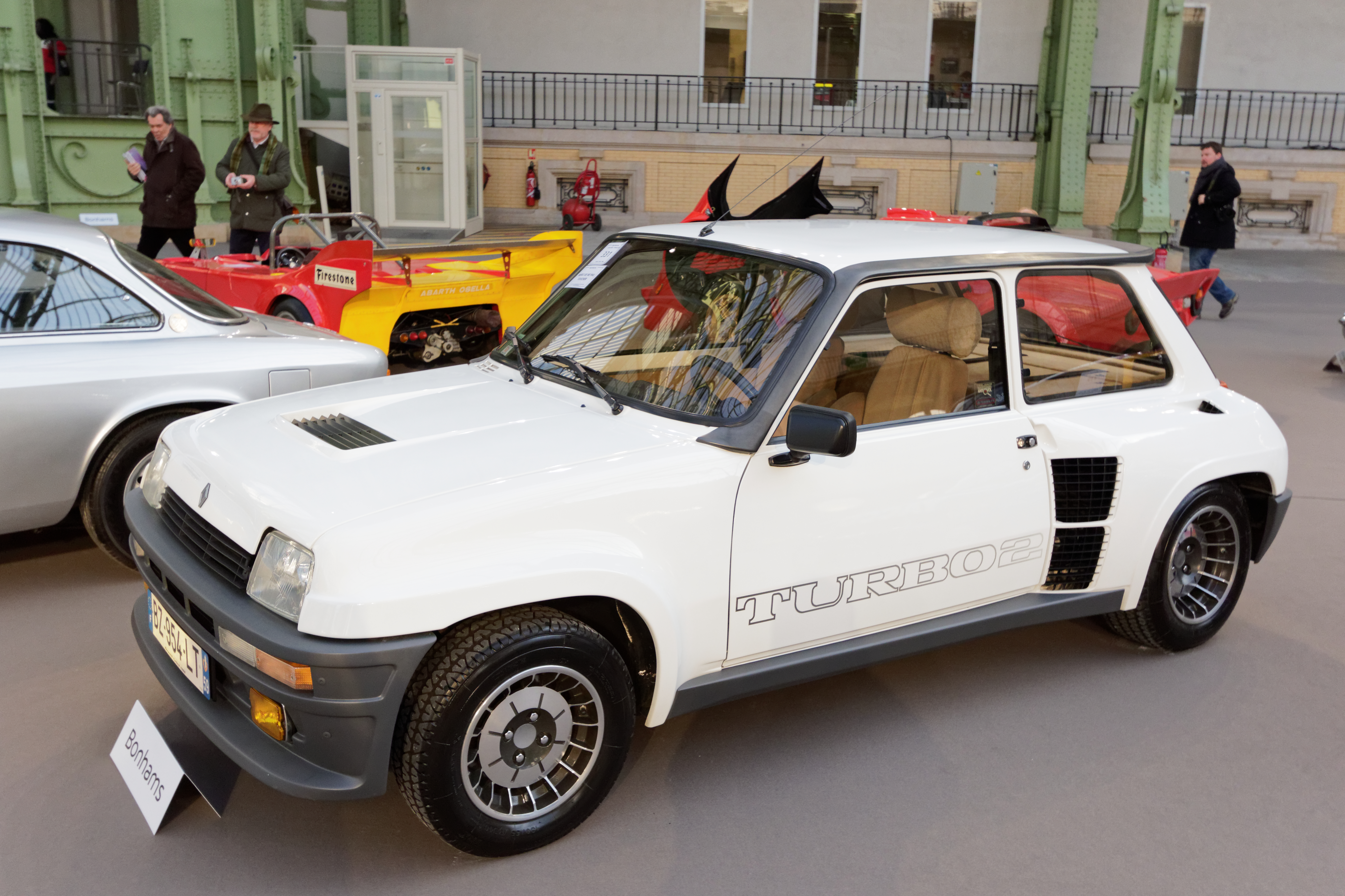 Un des véhicules présenté lors de la vente aux enchères Bonhams 2015 au Grand Palais de Paris.